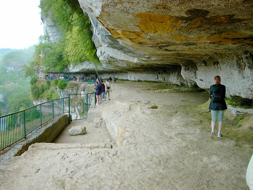 Roque Saint Christophe en Dordogne